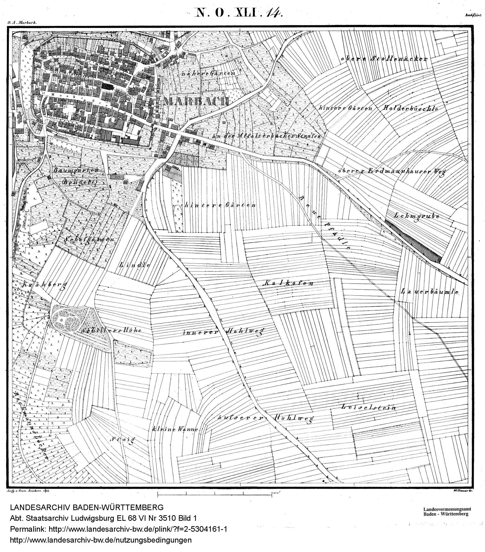 Marbach auf der württembergischen Urflurkarte, Kartenblatt NO XLI-14 von 1832